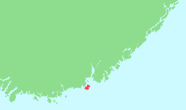 Locator map of Flekkerøya, Vest-Agder, Norway